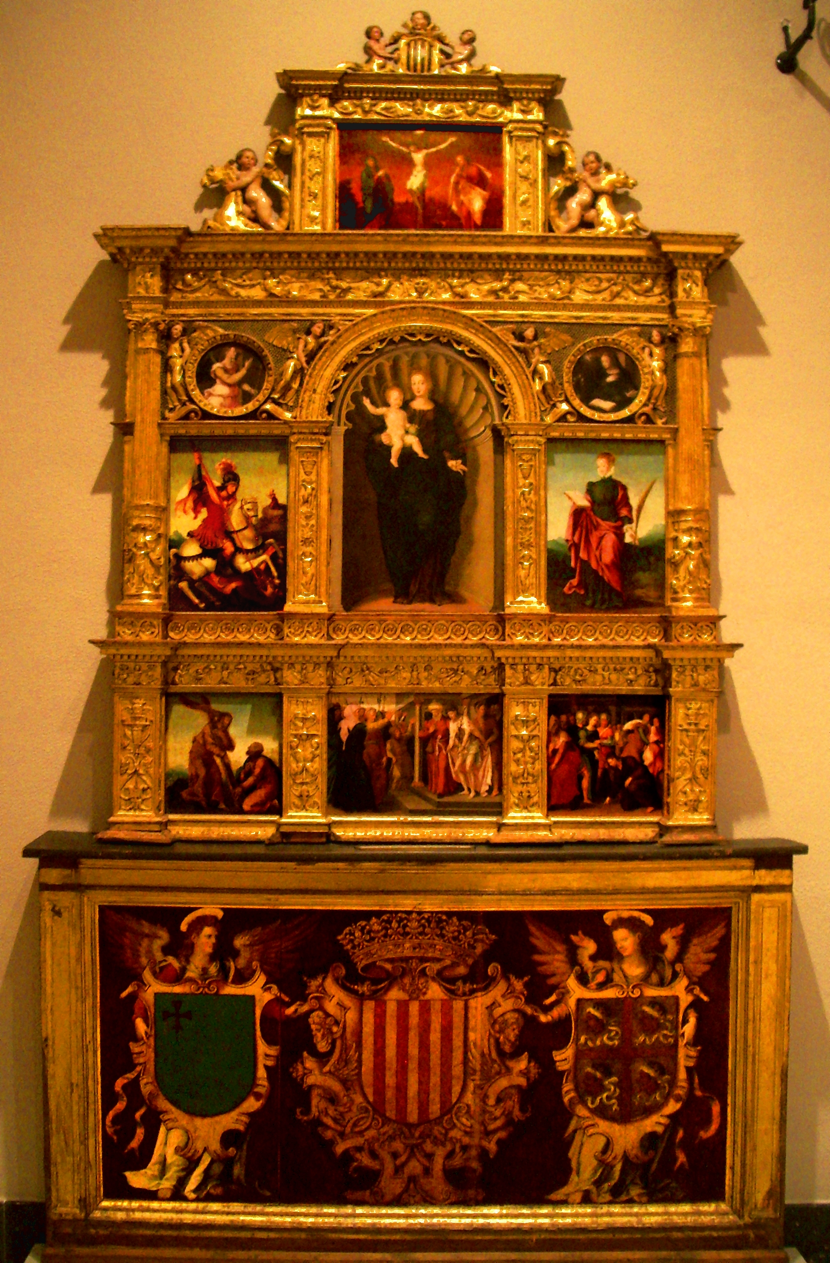 Retablo de la Virgen (Localización: Museo de Zaragoza)